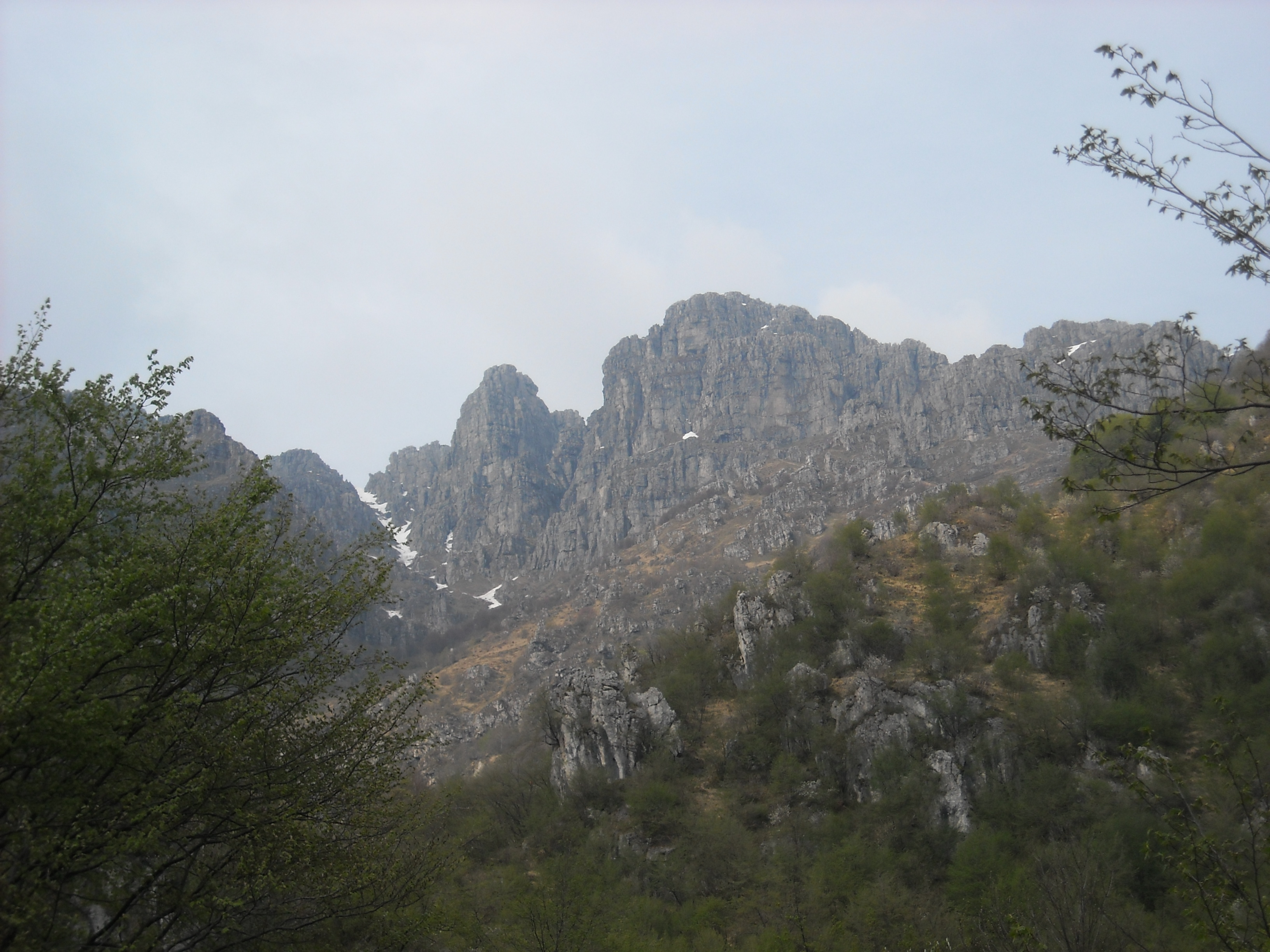 Il Resegone visto da Erve.